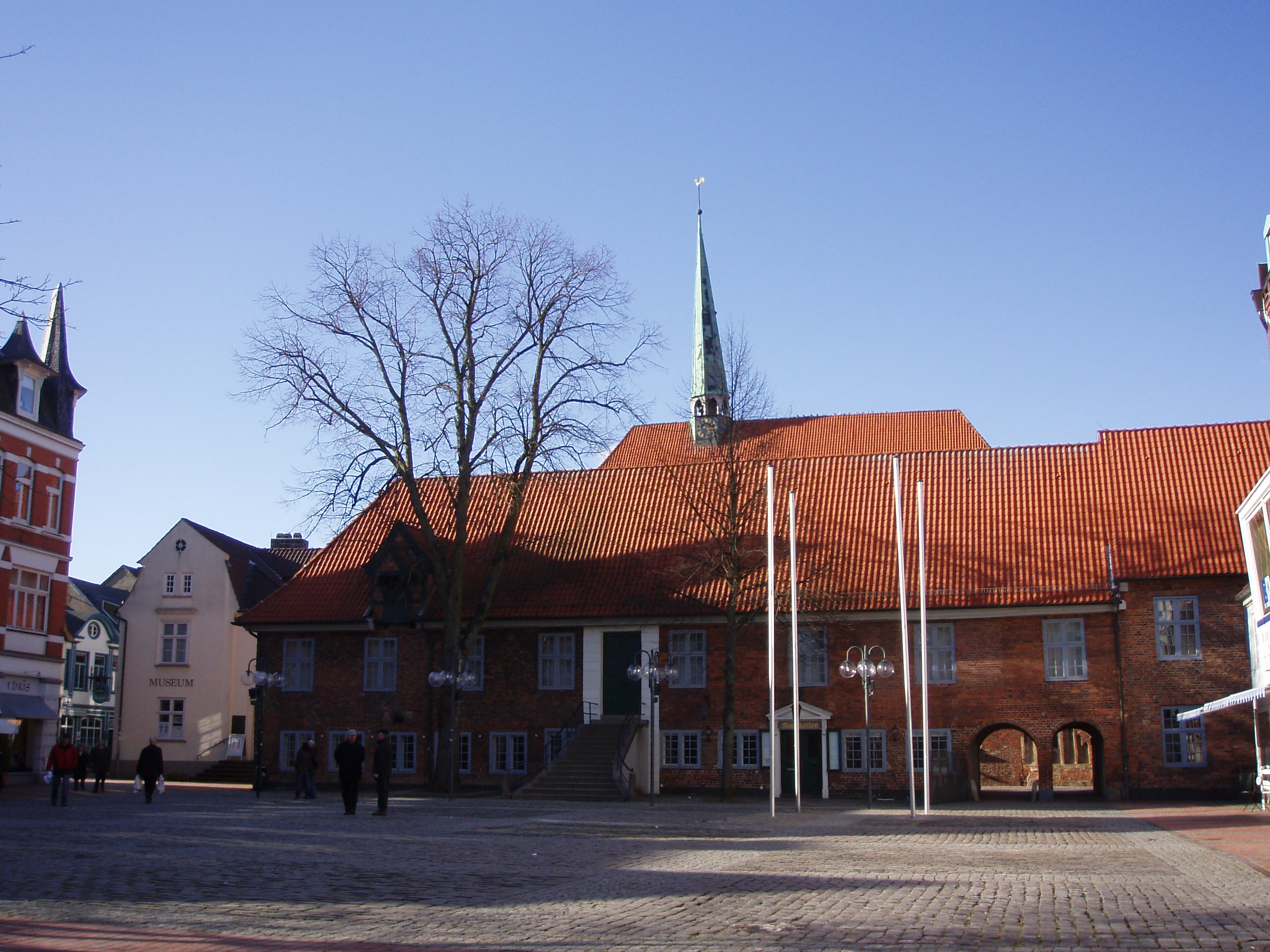 Altes Rathaus und Museum in Eckernförde